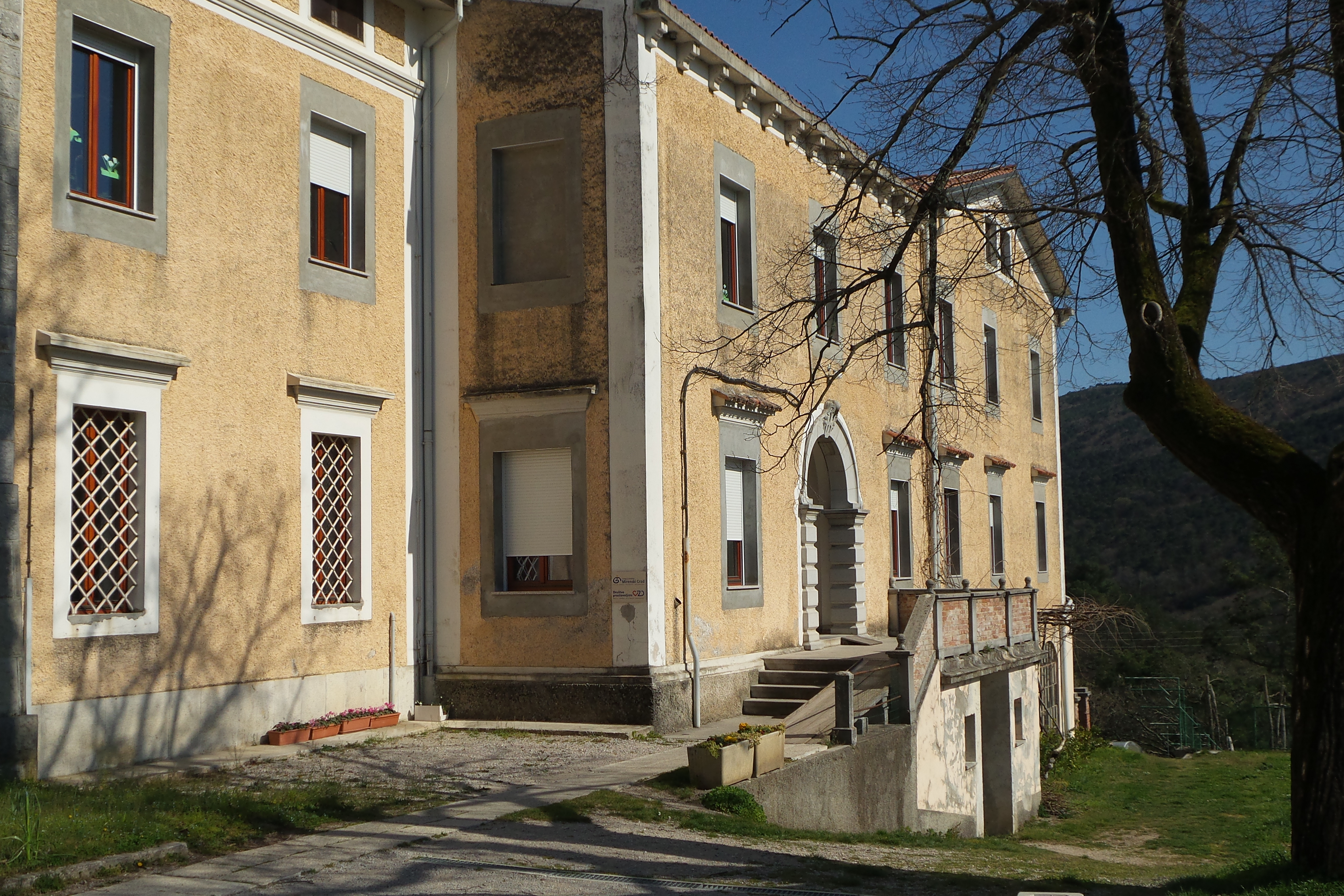 Marijin dom